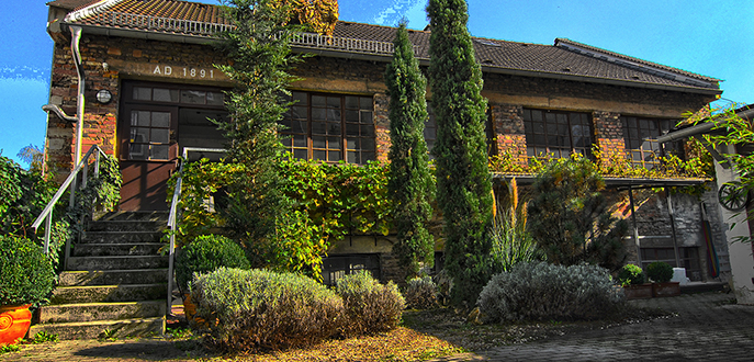 Talberg Museum